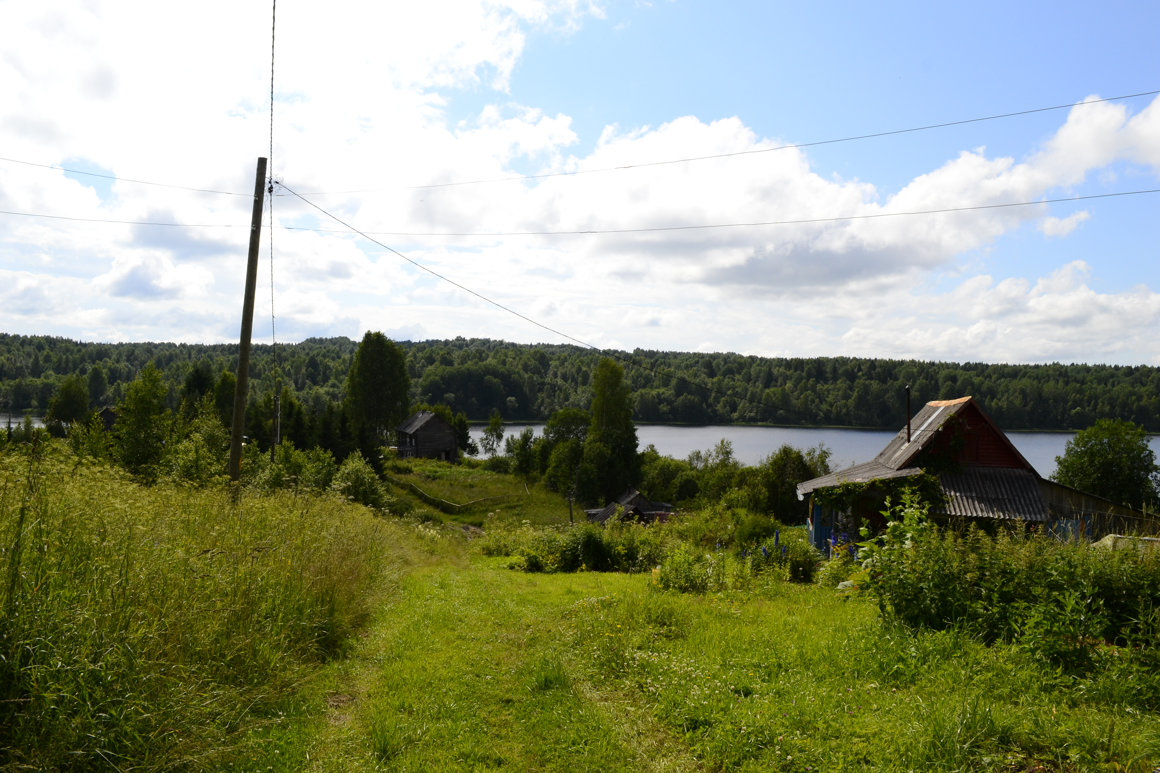 Vaade Kuujärve külale